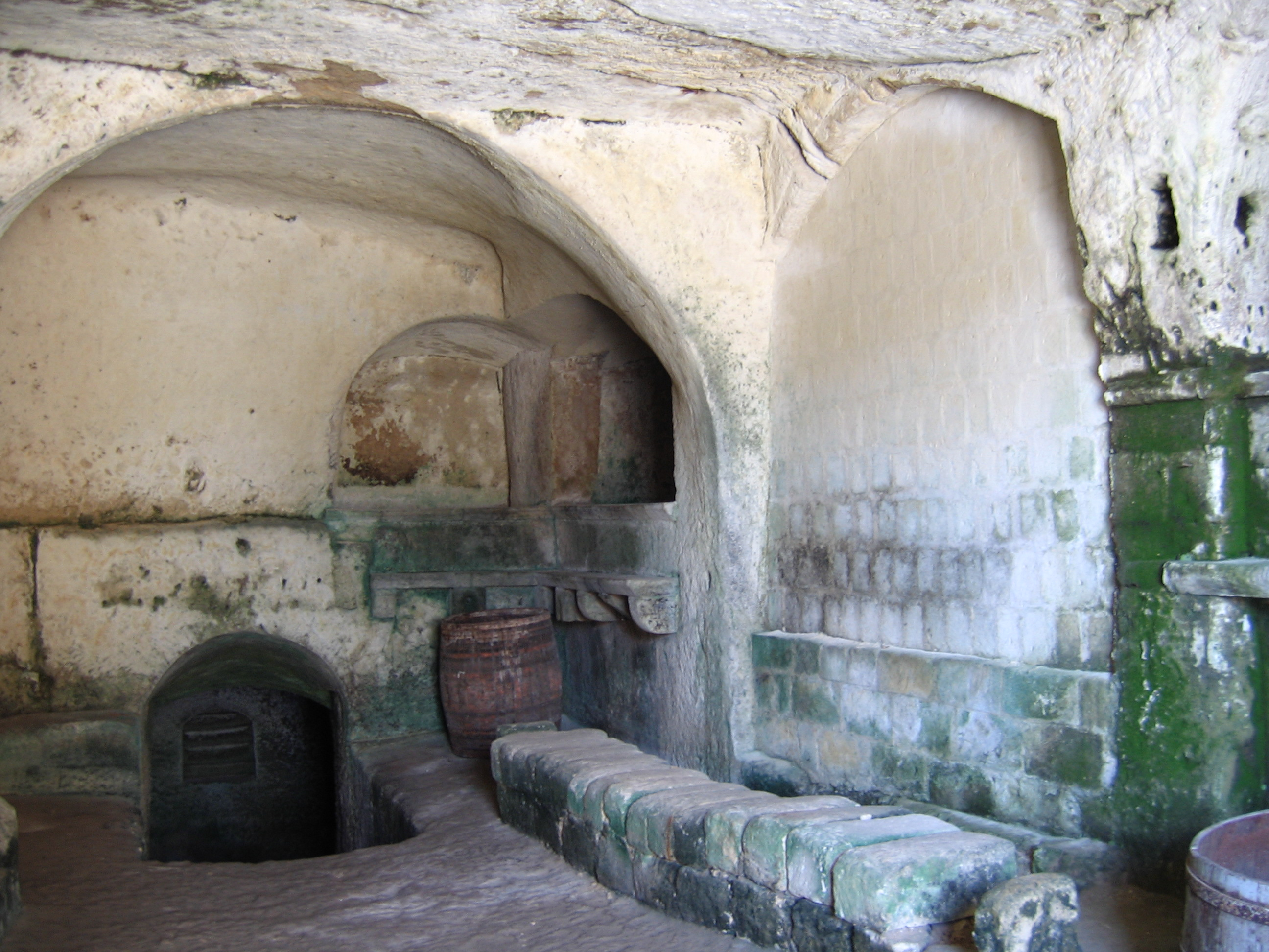 Intérieur d'habitation avec citerne Tutte le foto importate su il sito di Matera sono delle foto personale fatte al' ocazione delle ferie (vacanze) nelle Puglie ; sono libere di tutti i diritti. source : photo personnnelle Dominique grassigli